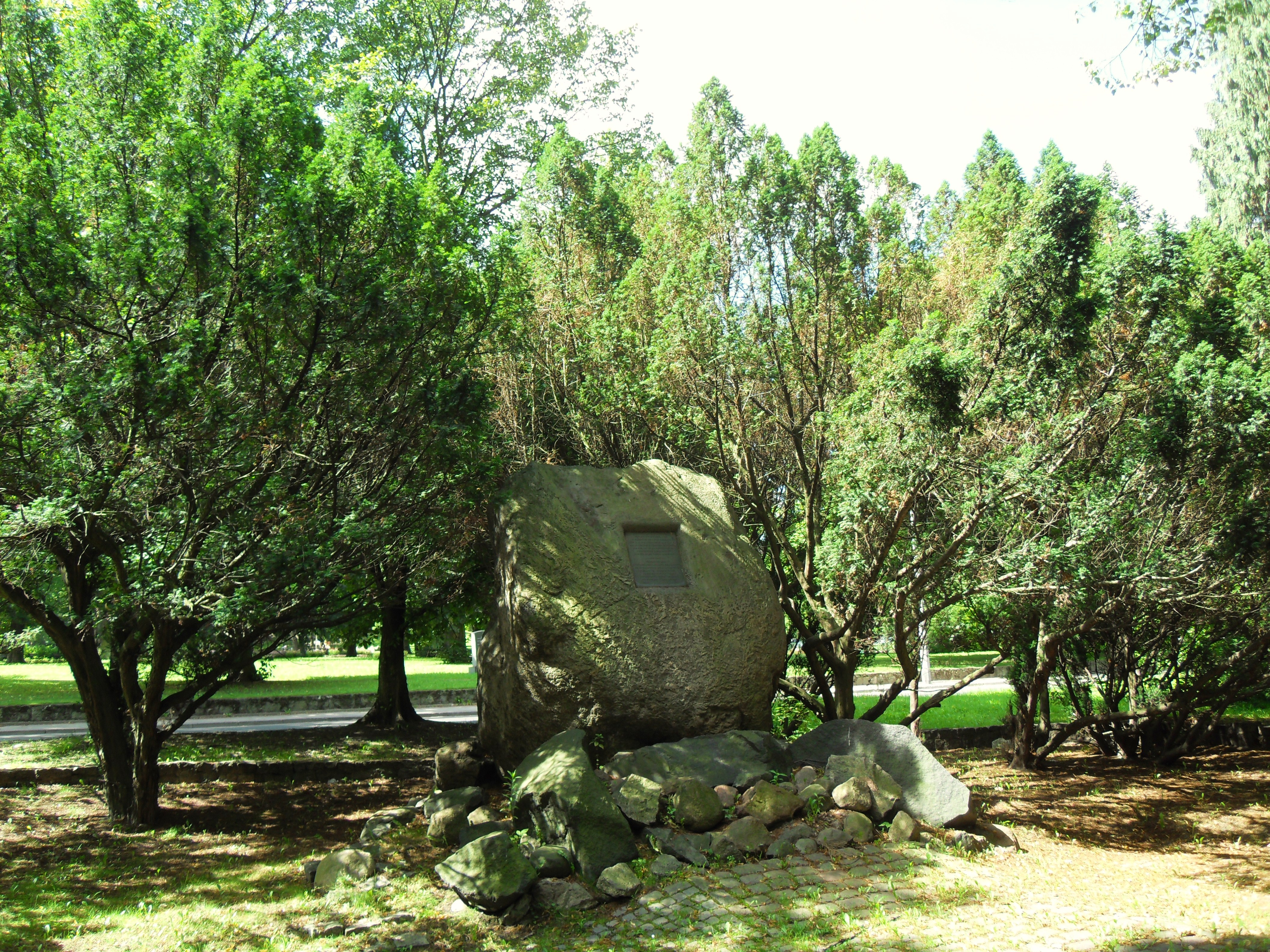 Pomnik Daniela Gralatha w Wielkiej Alei, w Gdańsku.